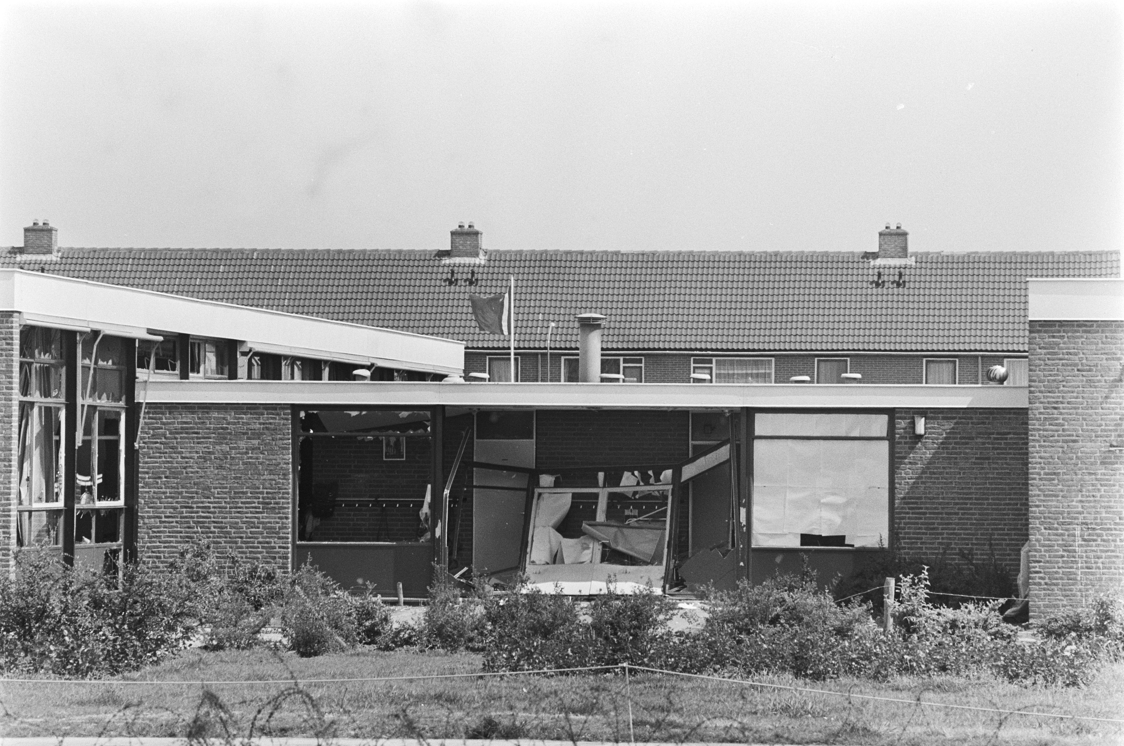 Collectie / Archief : Fotocollectie Anefo Reportage / Serie : [ onbekend ] Beschrijving : School Bovensmilde na aanval met muur waardoor tank reed Datum : 11 juni 1977 Locatie : Bovensmilde Trefwoorden : gijzelingen, scholen, tanks Fotograaf : Peters, Hans / Anefo Auteursrechthebbende : Nationaal Archief Materiaalsoort : Negatief (zwart/wit) Nummer archiefinventaris : bekijk toegang 2.24.01.05 Bestanddeelnummer : 929-2247